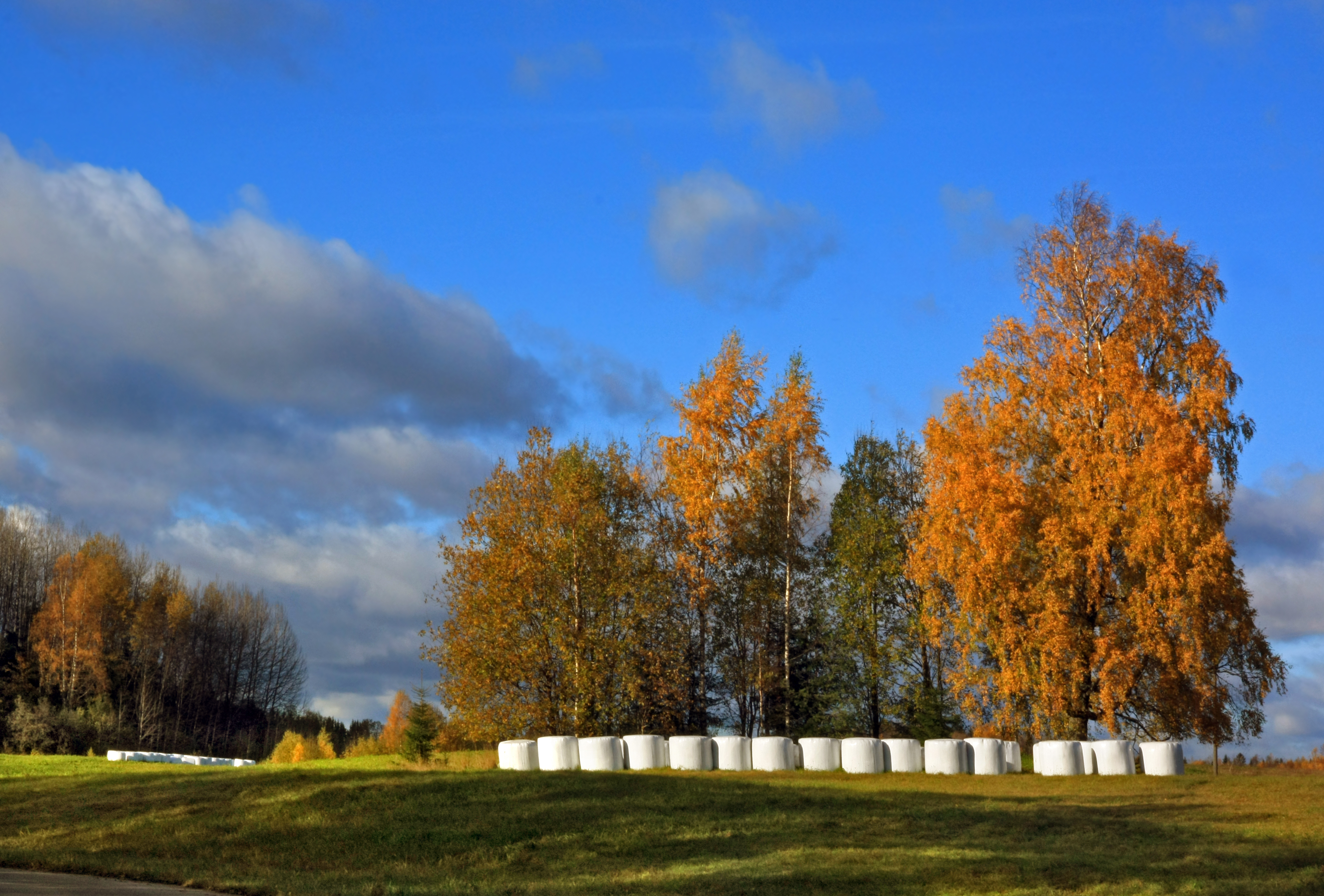 Ruloonides koresööt Plaani küla niidul